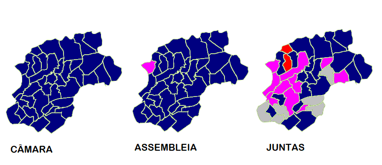 Mapa ilustrativo do partido mais votado por freguesia em Braga (2017)